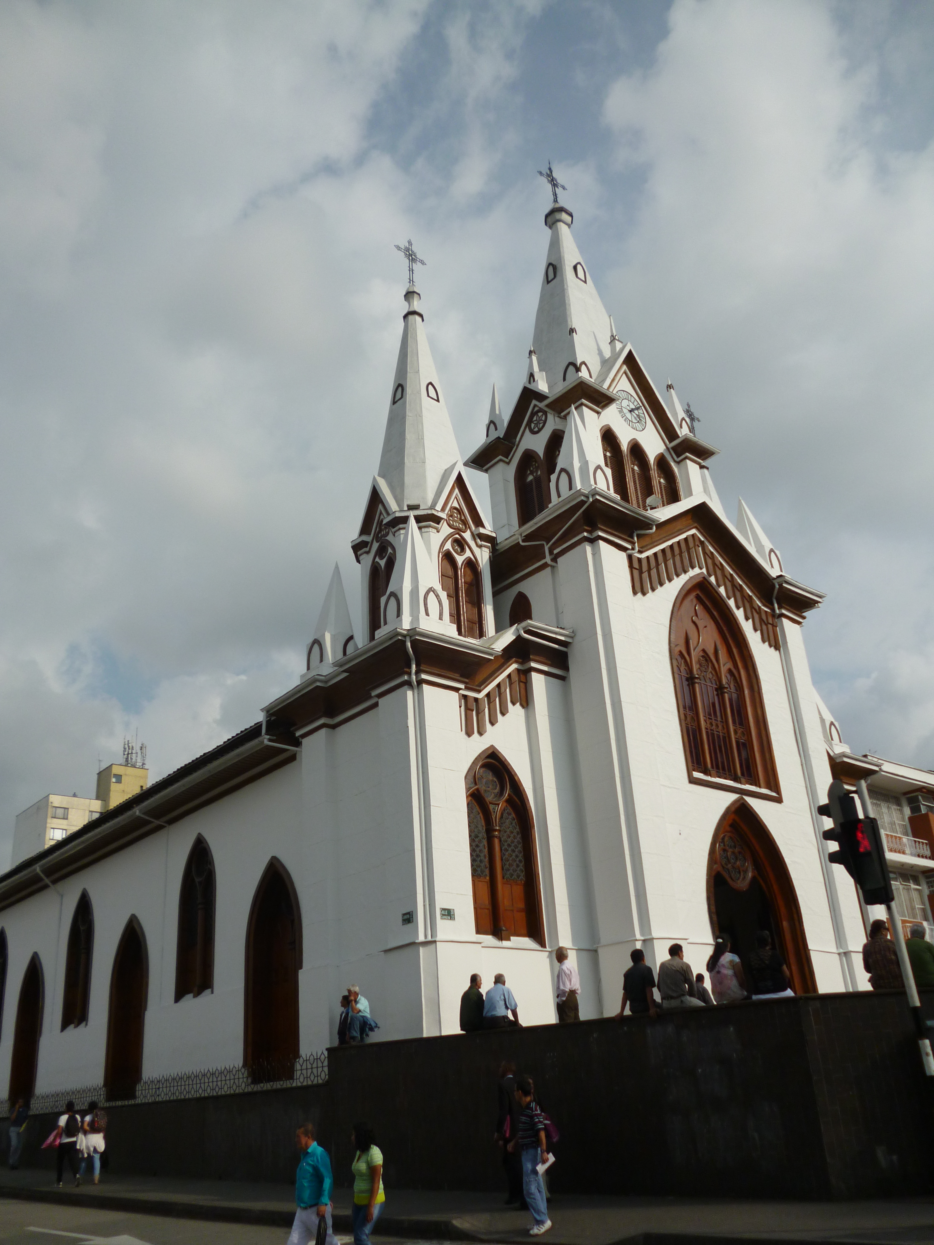 Vista de la iglesia Inmaculada Concepción Manizales